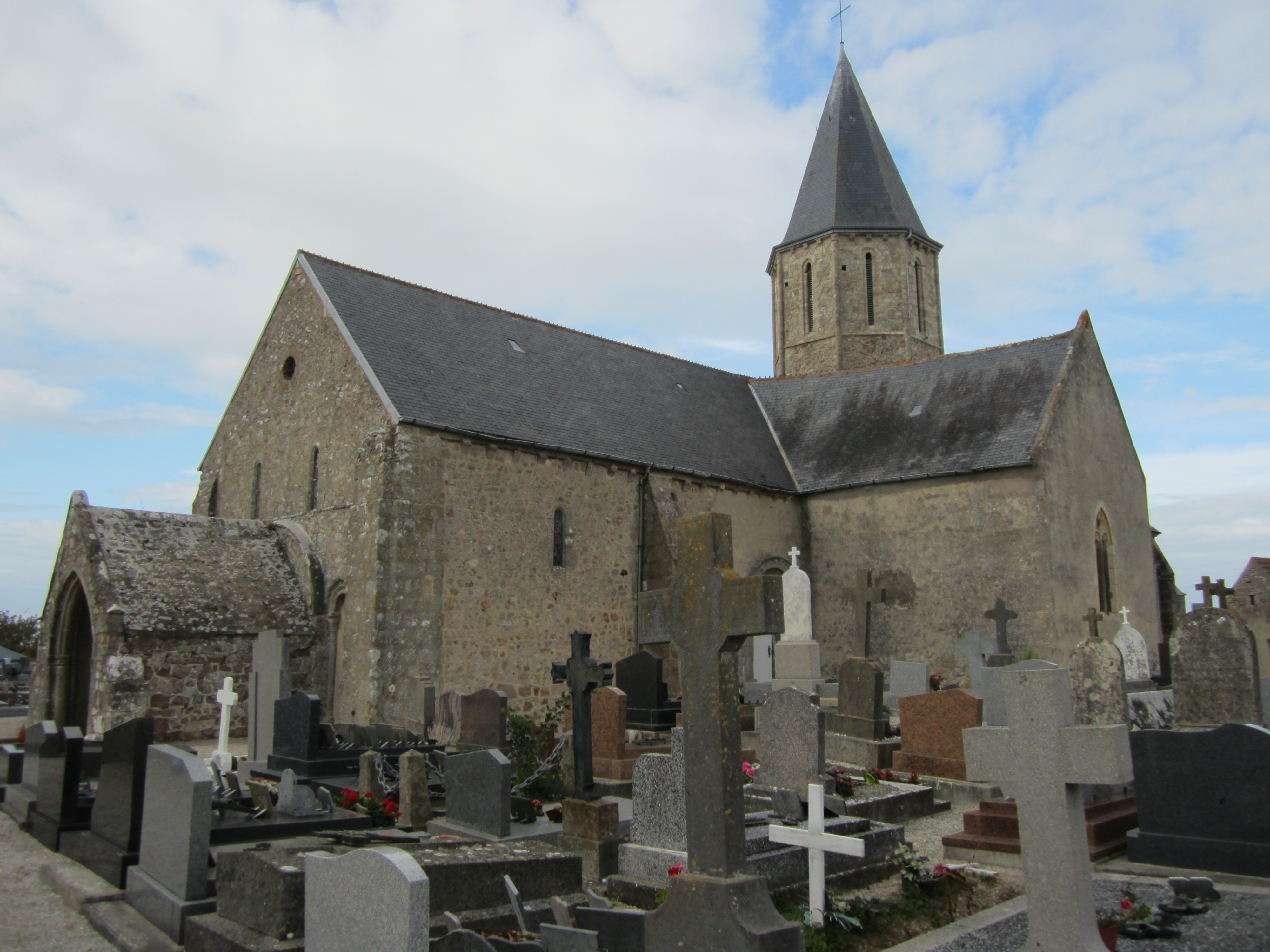 Cosqueville, Manche